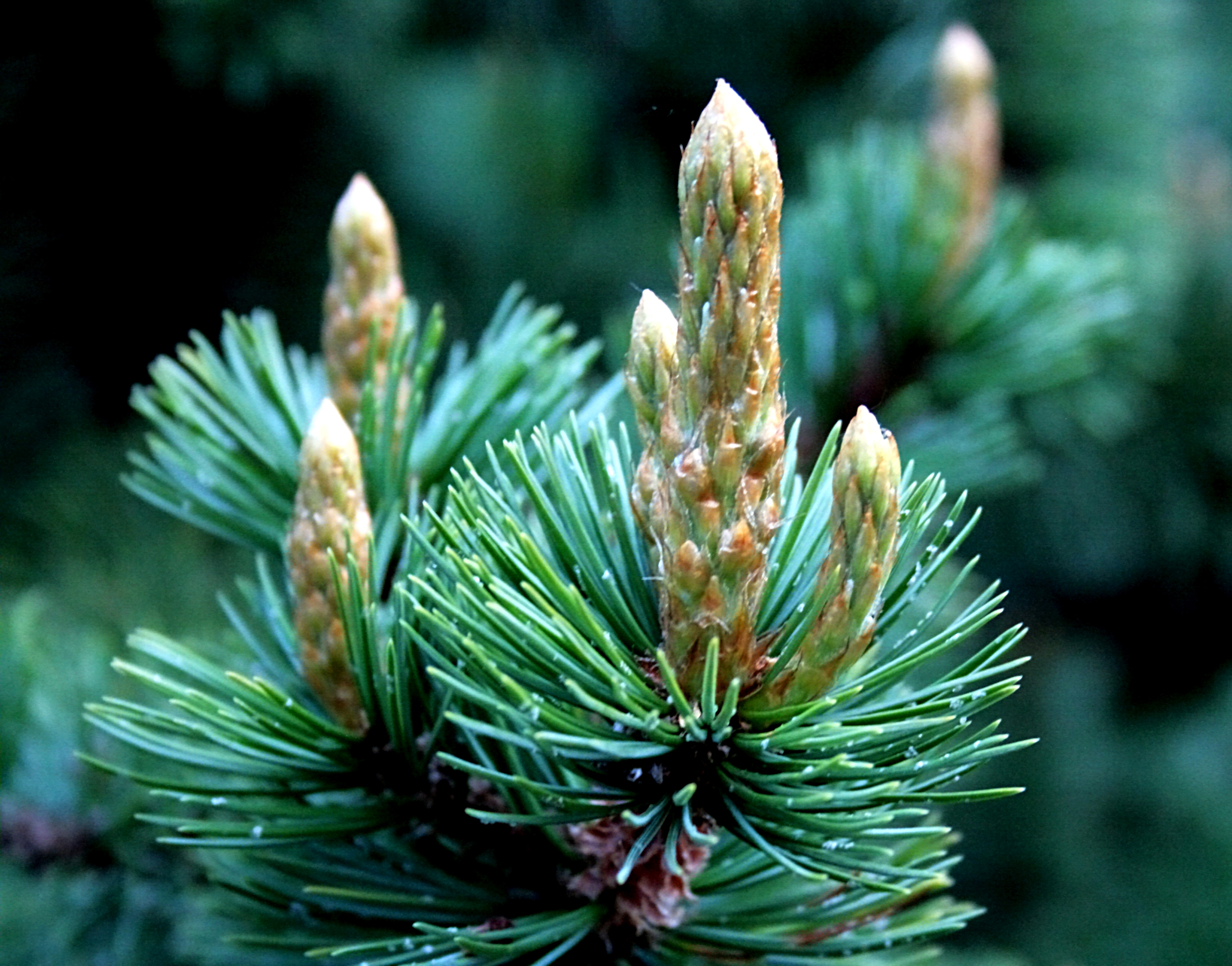 Ísland, Akureyri Botanical Gardens: Grannen-Kiefer